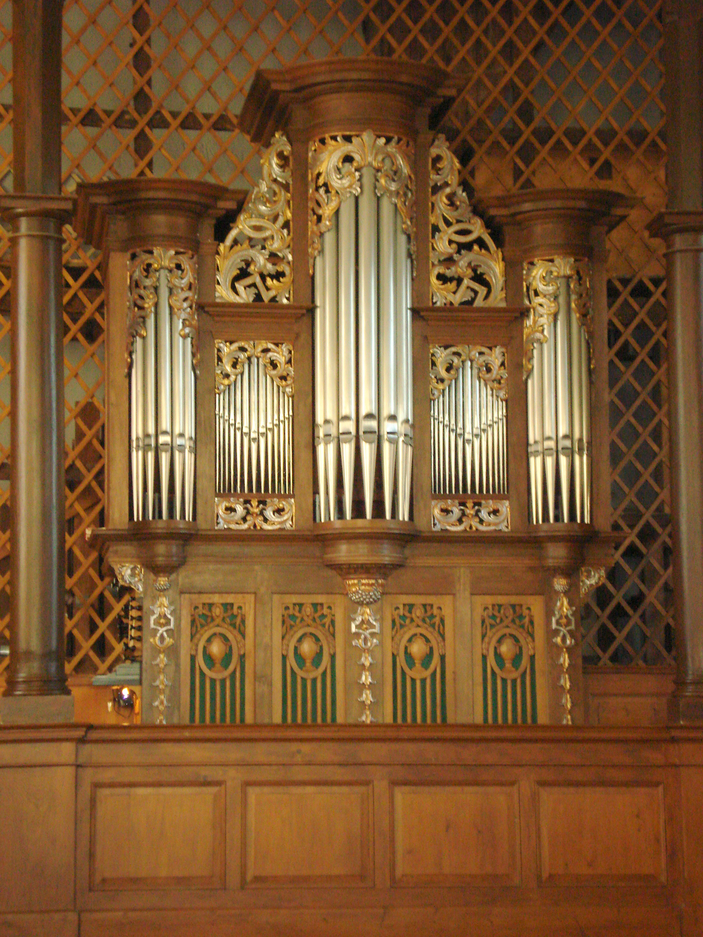 Orgel der Kleinen Kirche Alzey, Rheinland-Pfalz, Deutschland